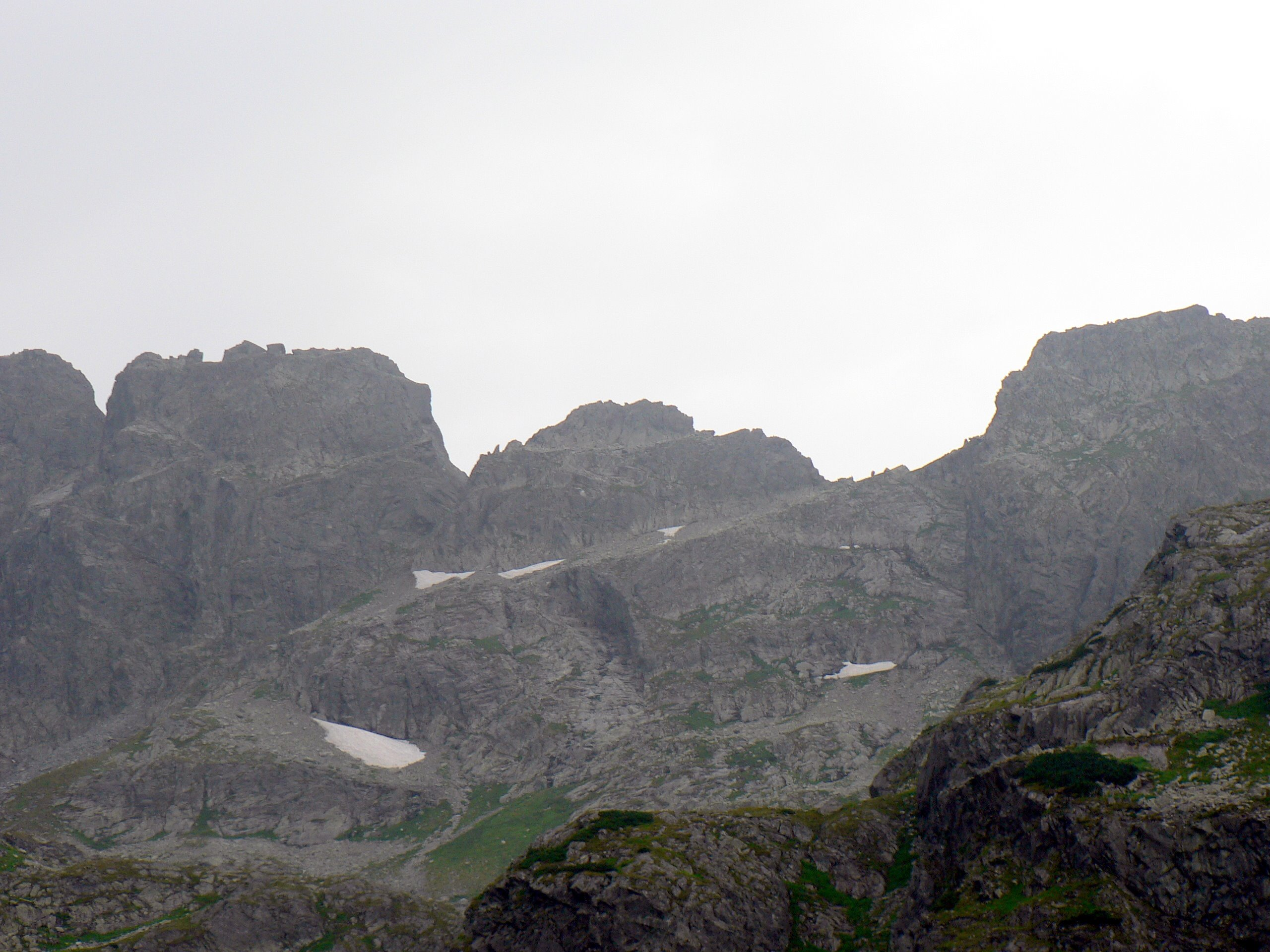 Kozie Czuby, Kozia Przełęcz, Zamarła Turnia i Zmarzła Przełęcz